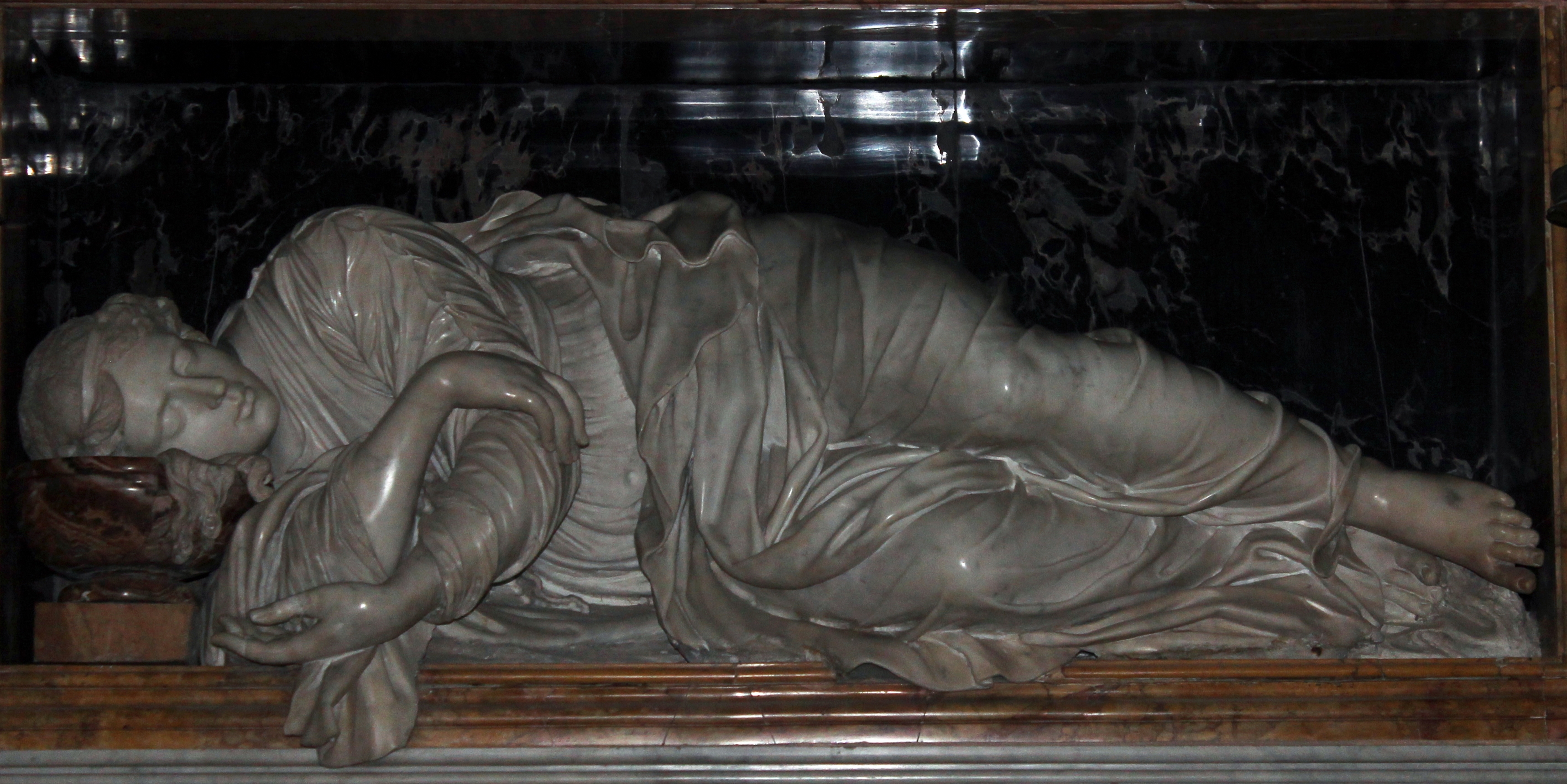 Niccolò Menghini – Santa Martina